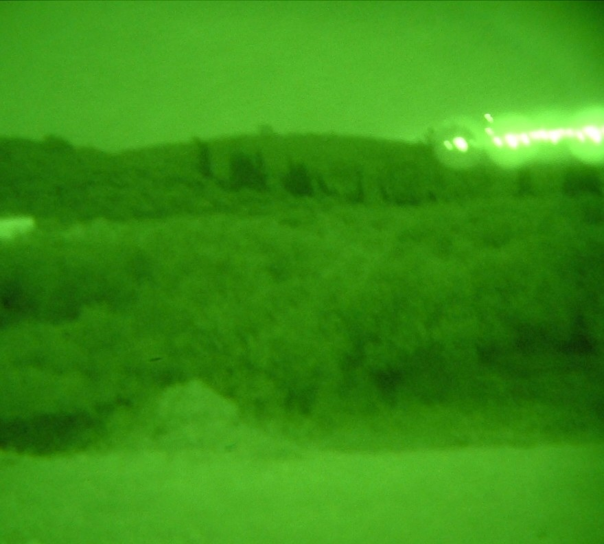 תמונה שצולמה דרך אמר"ל הגברת אור. התמונה הינה באיכות נמוכה יחסית ואינה משקפת את איכות התמונה הרגילה.